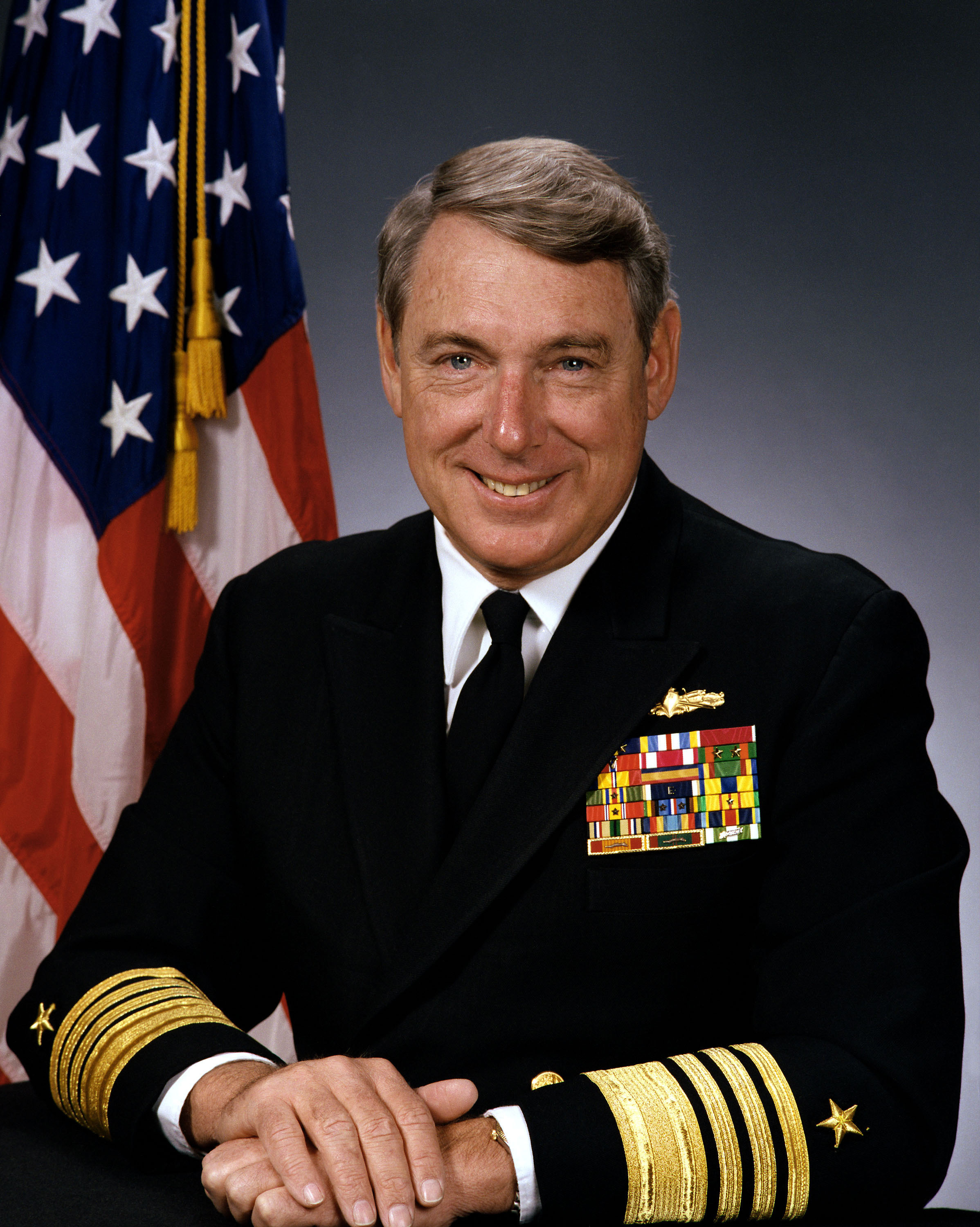 Admiral Henry H. Mauz